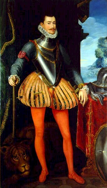 Retrato de Don Juan de Austria (1547-1578), que fue hijo ilegítimo del emperador Carlos I de España y hermanastro del rey Felipe II. Esta obra es una copia del retrato pintado por Alonso Sánchez Coello y conservado en el madrileño Museo del Prado, y fue adquirida para el Museo Naval de Madrid por una Real Orden del día 21 de junio de 1857, siendo además restaurada en 1993.